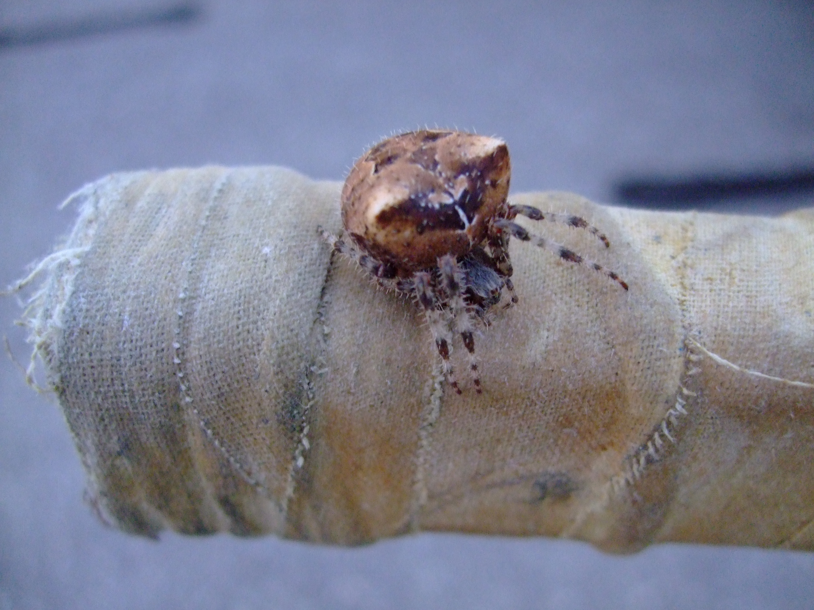 Photo de Araneus gemmoides sur le bout d'un bâton de hockey.